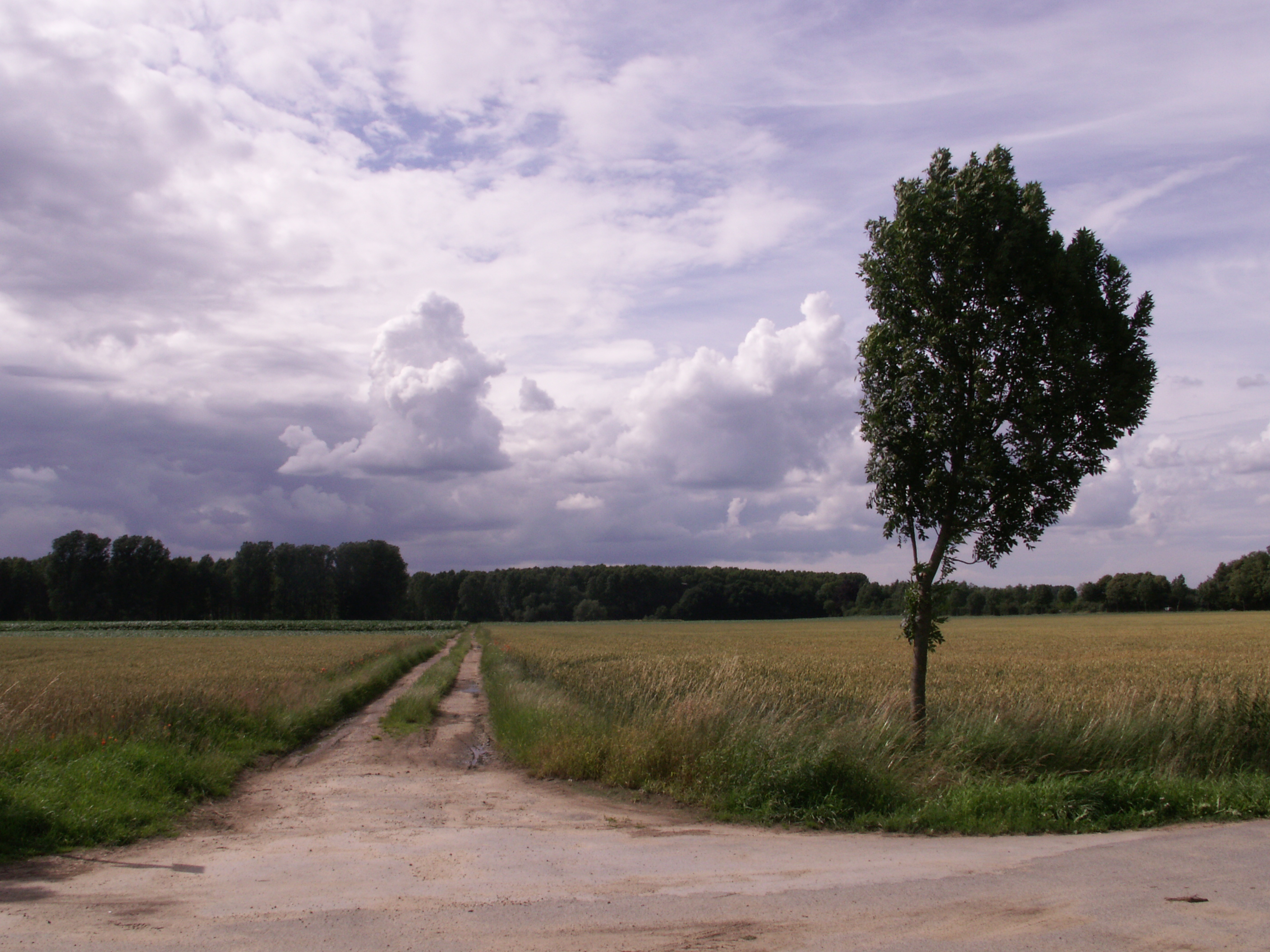 Landschafts-Motive aus dem Heinsberger Land.